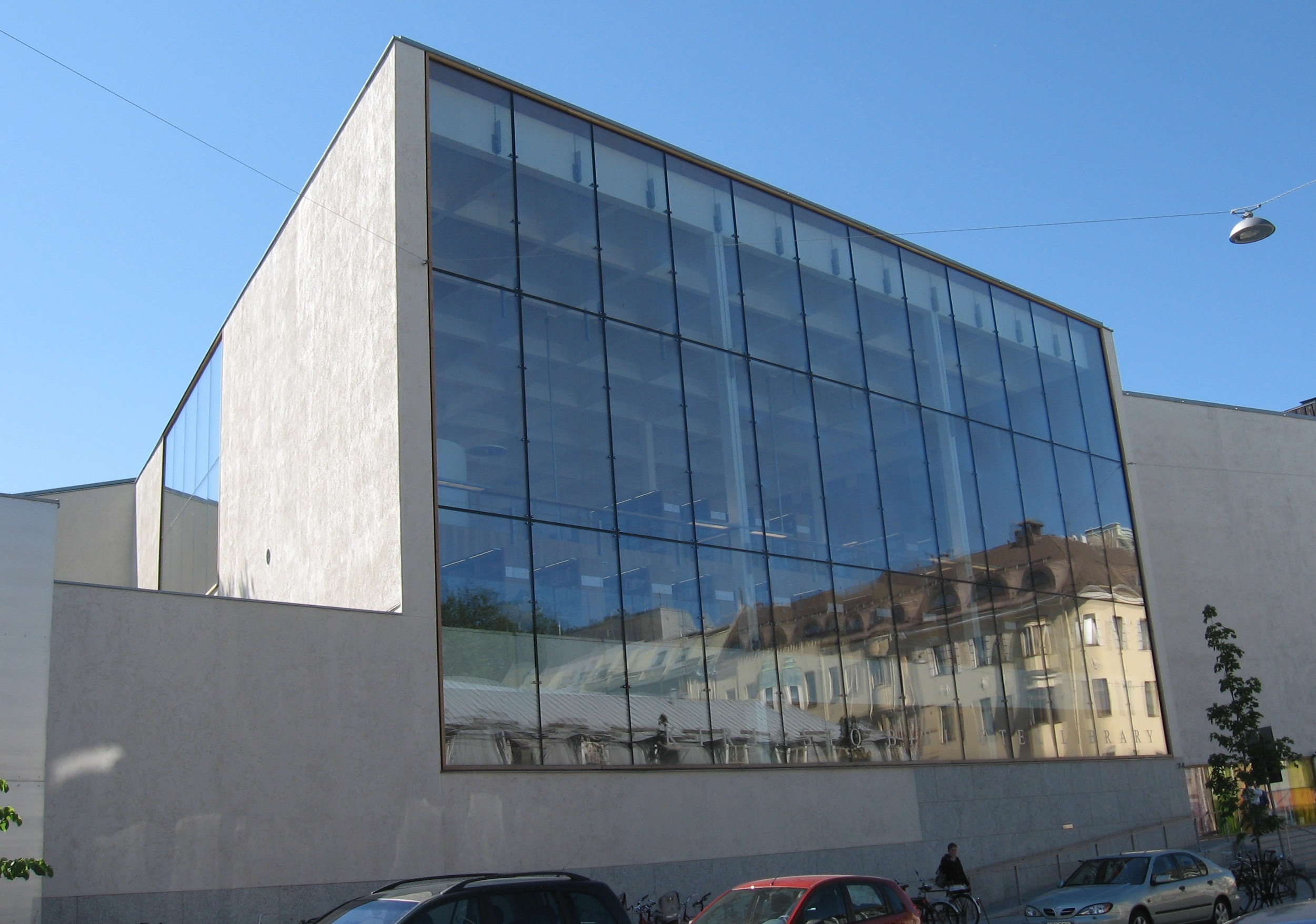 Turku Main library